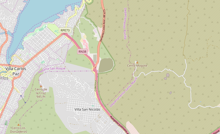 Mapa de ubucación Cerro Mogote, Malagueño, Córdoba